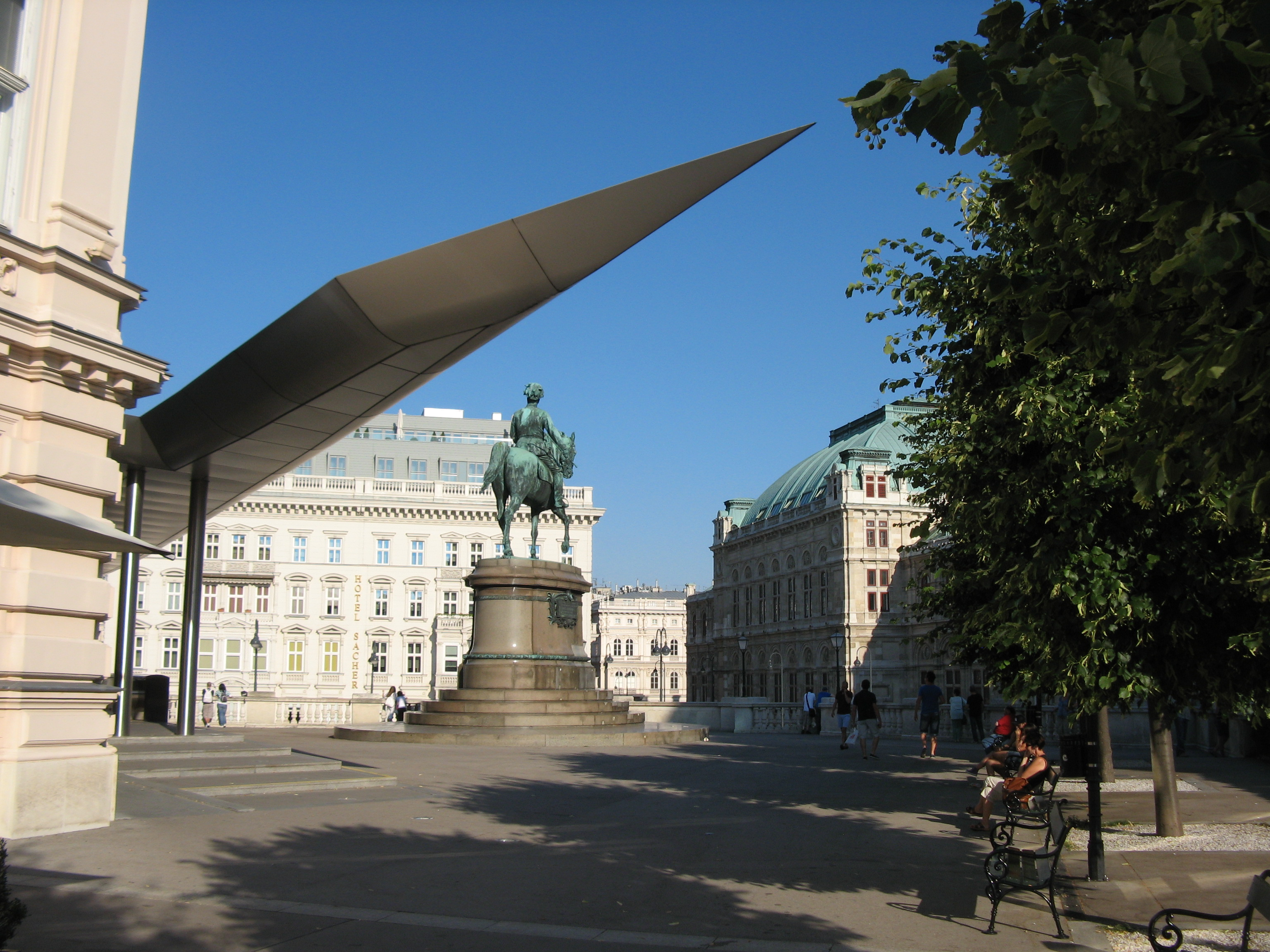 Augustinerbastei mit Erzherzog-Albrecht-Denkmal, Wien-Innere Stadt